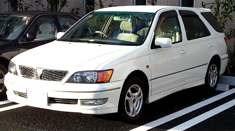 トヨタ・ビスタアルデオ